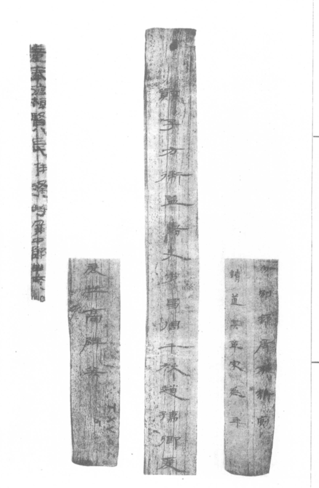 中文（中国大陆）: 流沙坠简上的简牍 1914年 日本京都东山学社